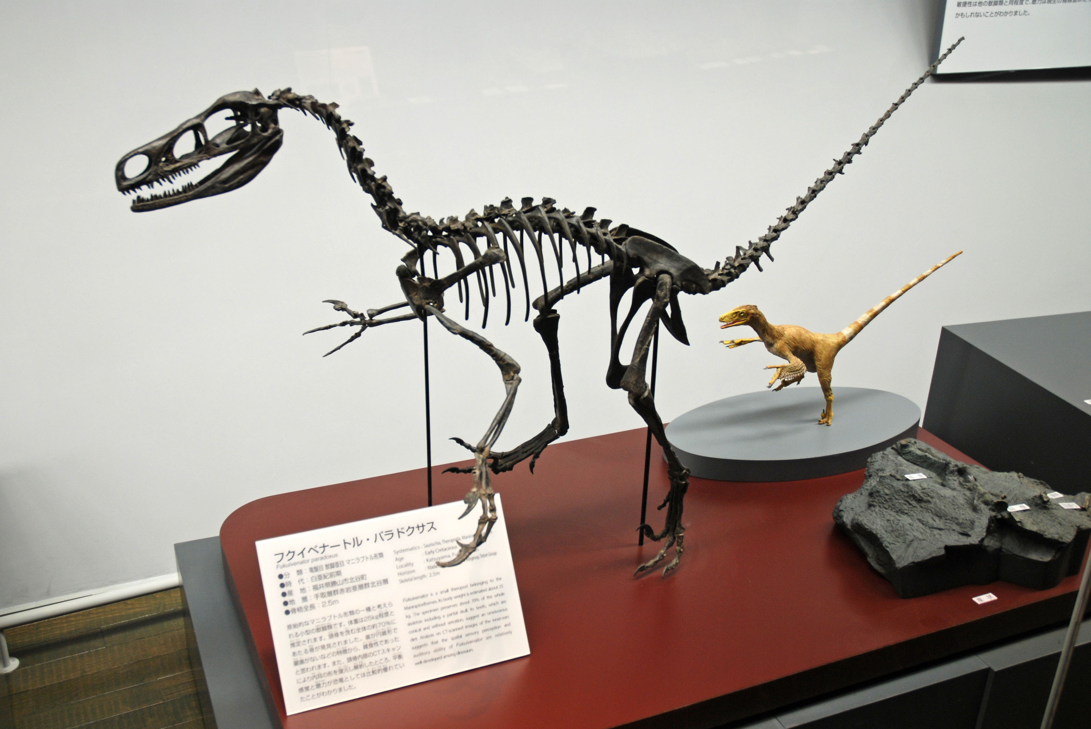 フクイベナートル全身骨格